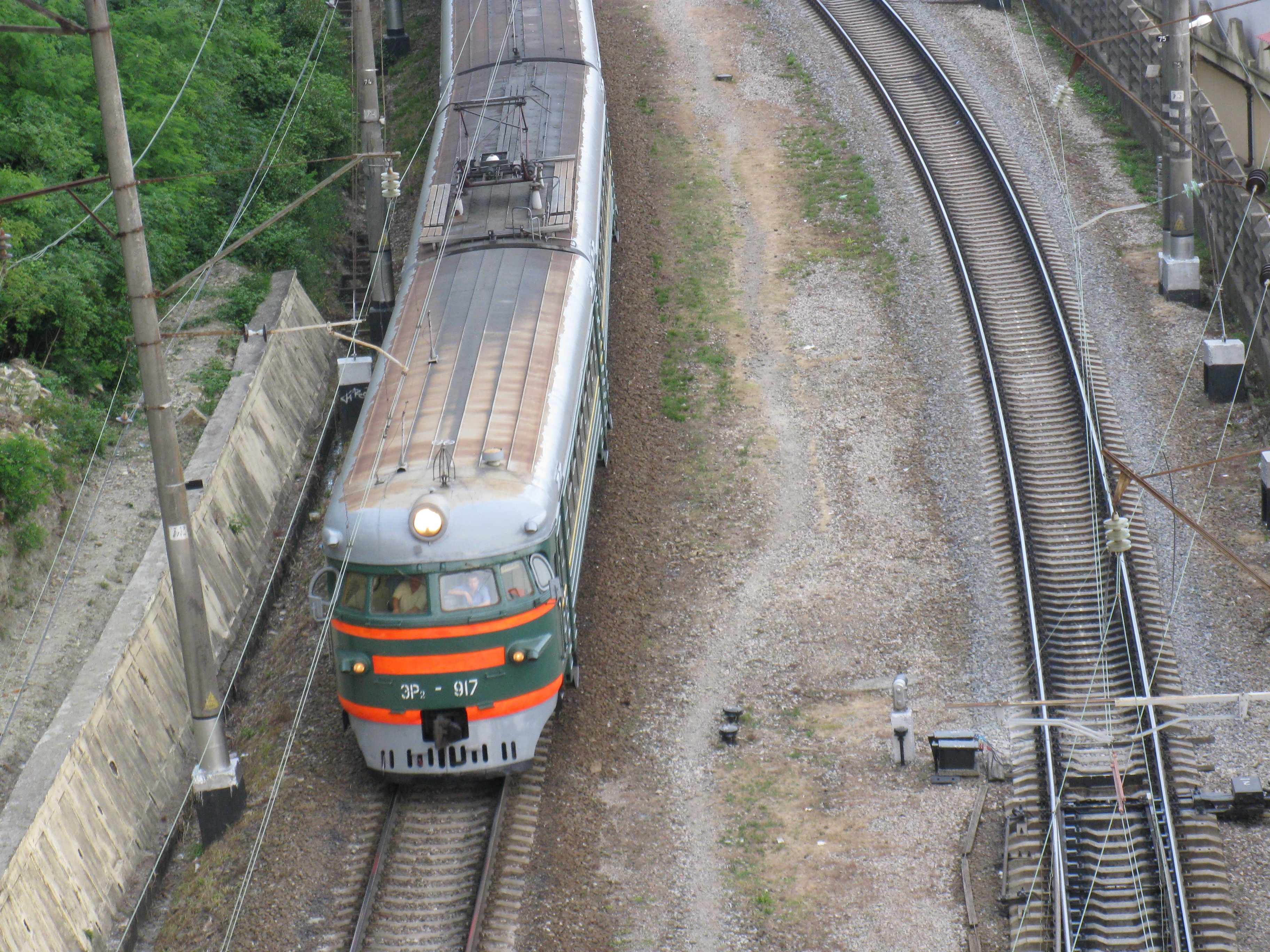 ЭР2-917 На Северо-Кавказской железной дороге недалеко от станции Дагомыс.